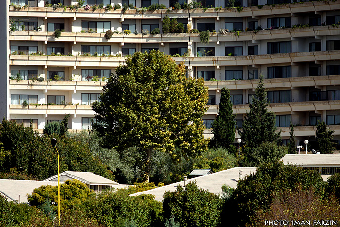 شهرک امید ، تهران ، ساختمان ستاره